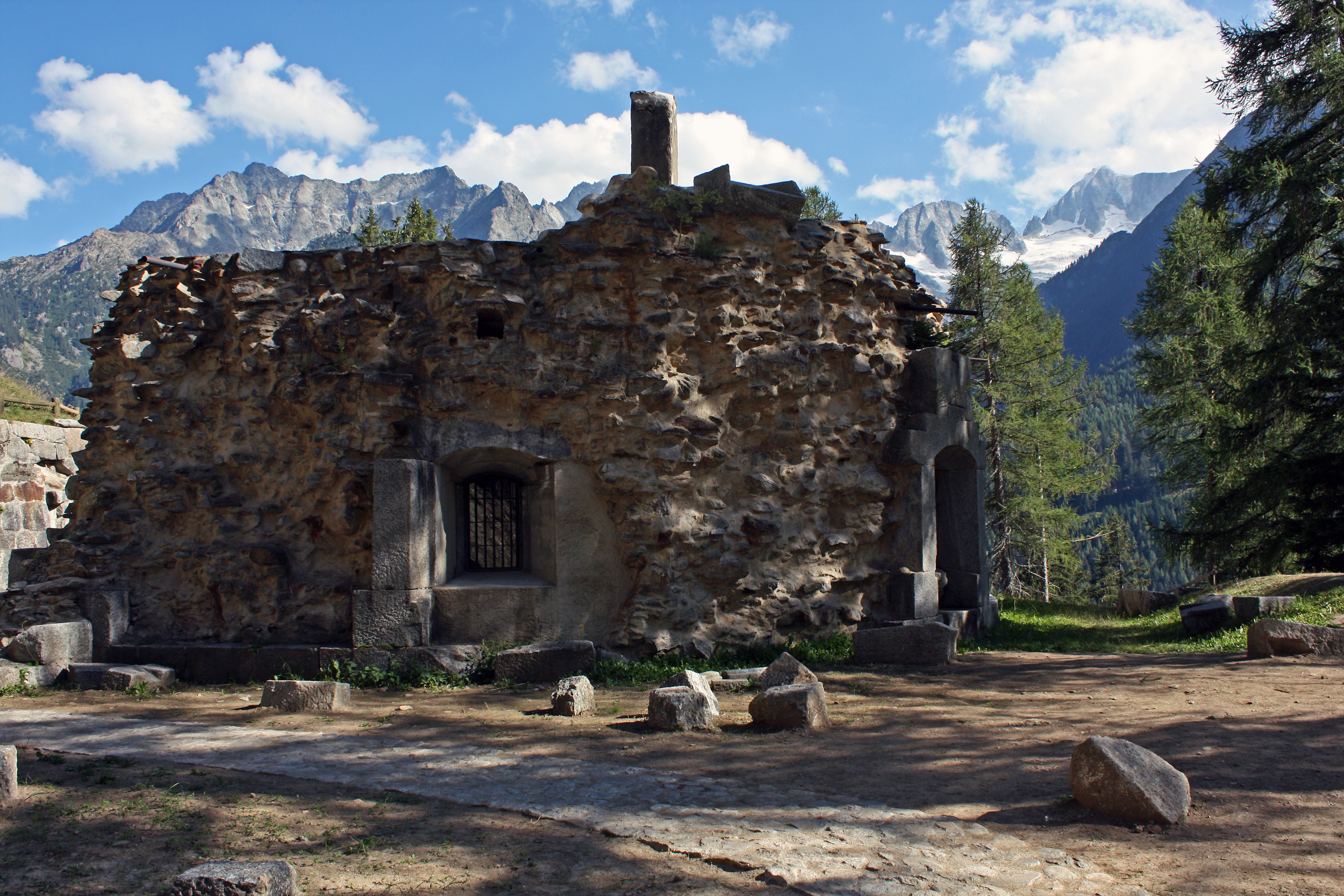 Werk Strino gegen die Presanella